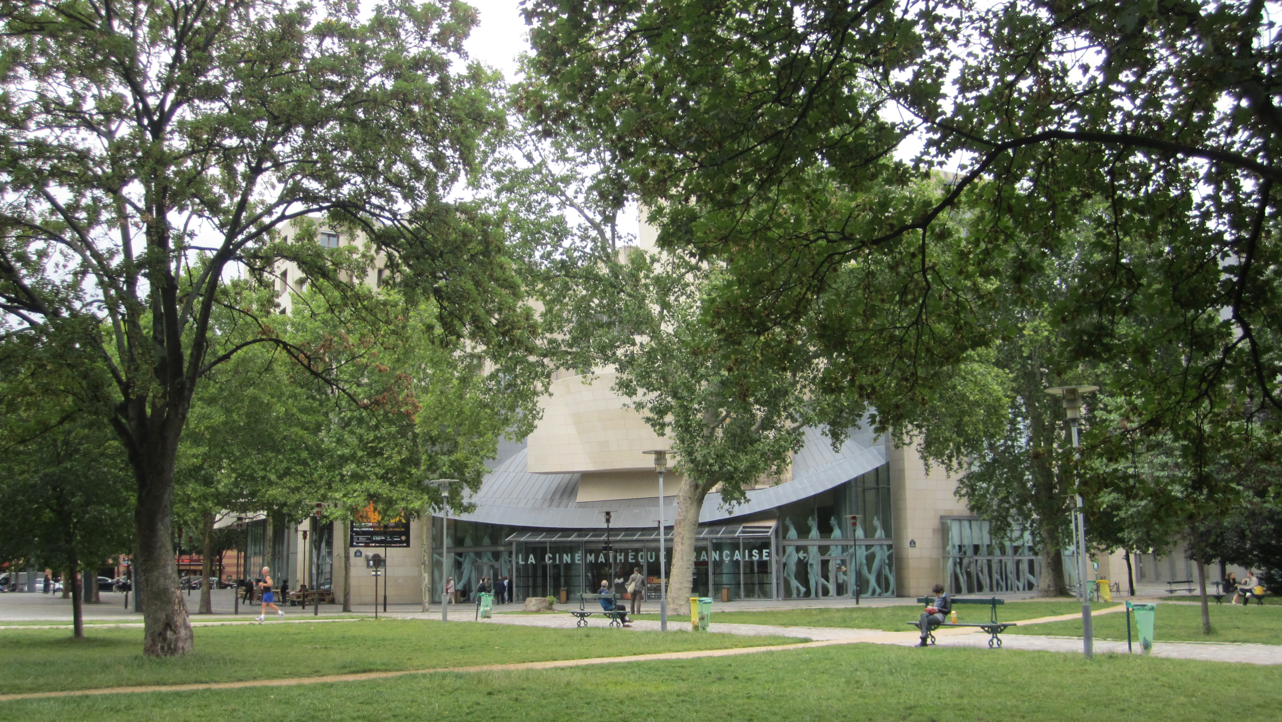 Parc de Bercy